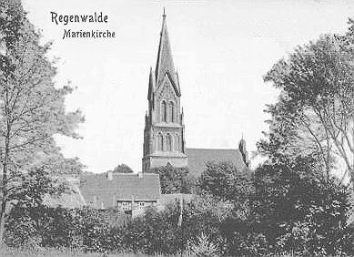 Resko - kościół pw. Niepokalanego Poczęcia NMP (zabytek nr 337) Marienkirche Regenwalde, Pommern about 1900